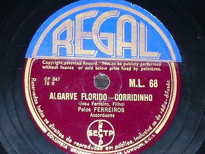 Corridinho da autorria de José Ferreiro Filho, pelos Ferreiros